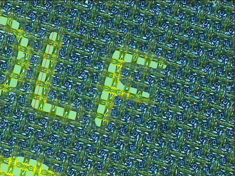 Siebdruck, das L ist 2mm lang